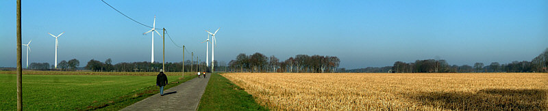 Großenkneten, Feldweg Richtung Döhlen